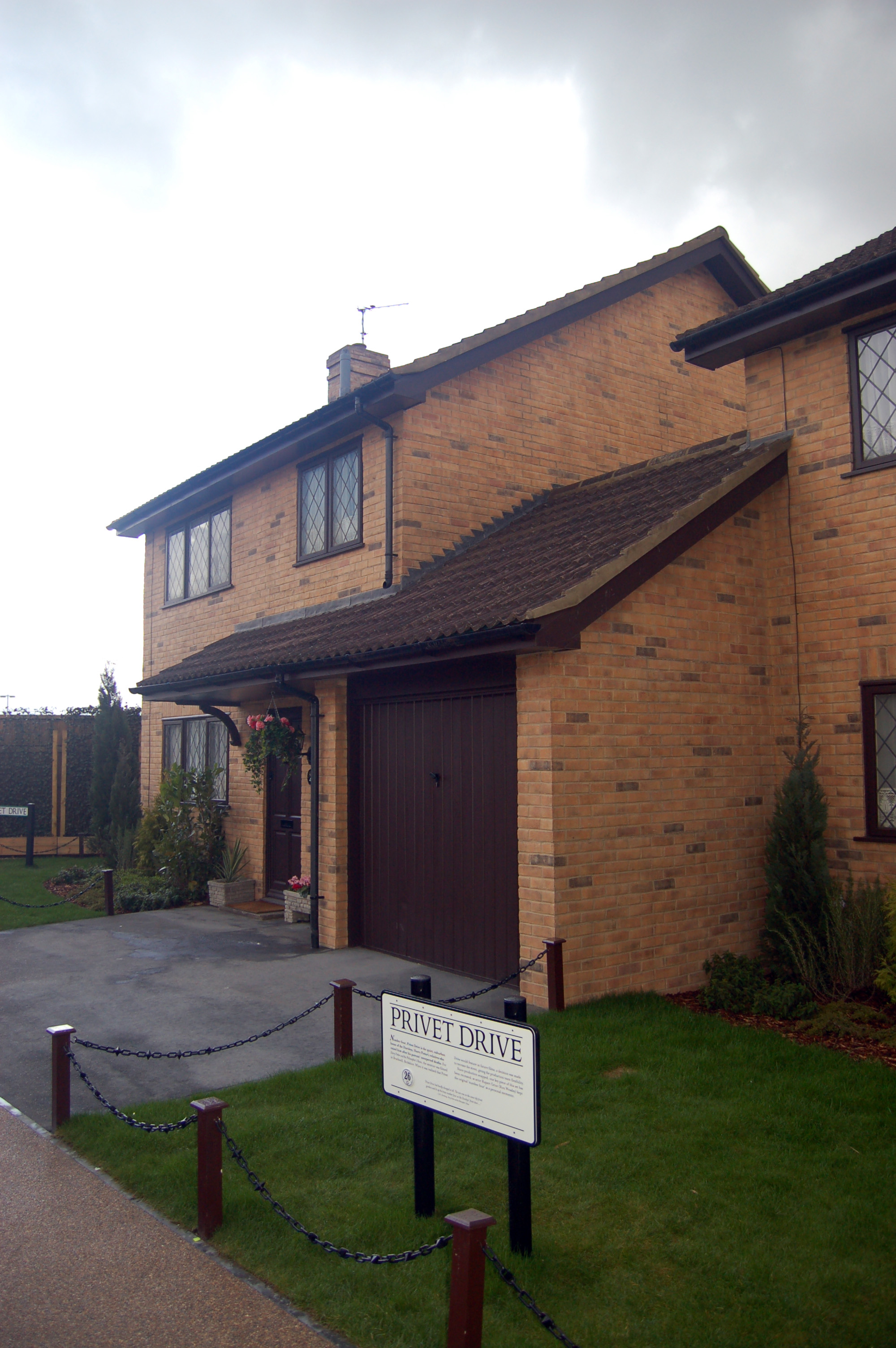 Number 4, Privet Drive